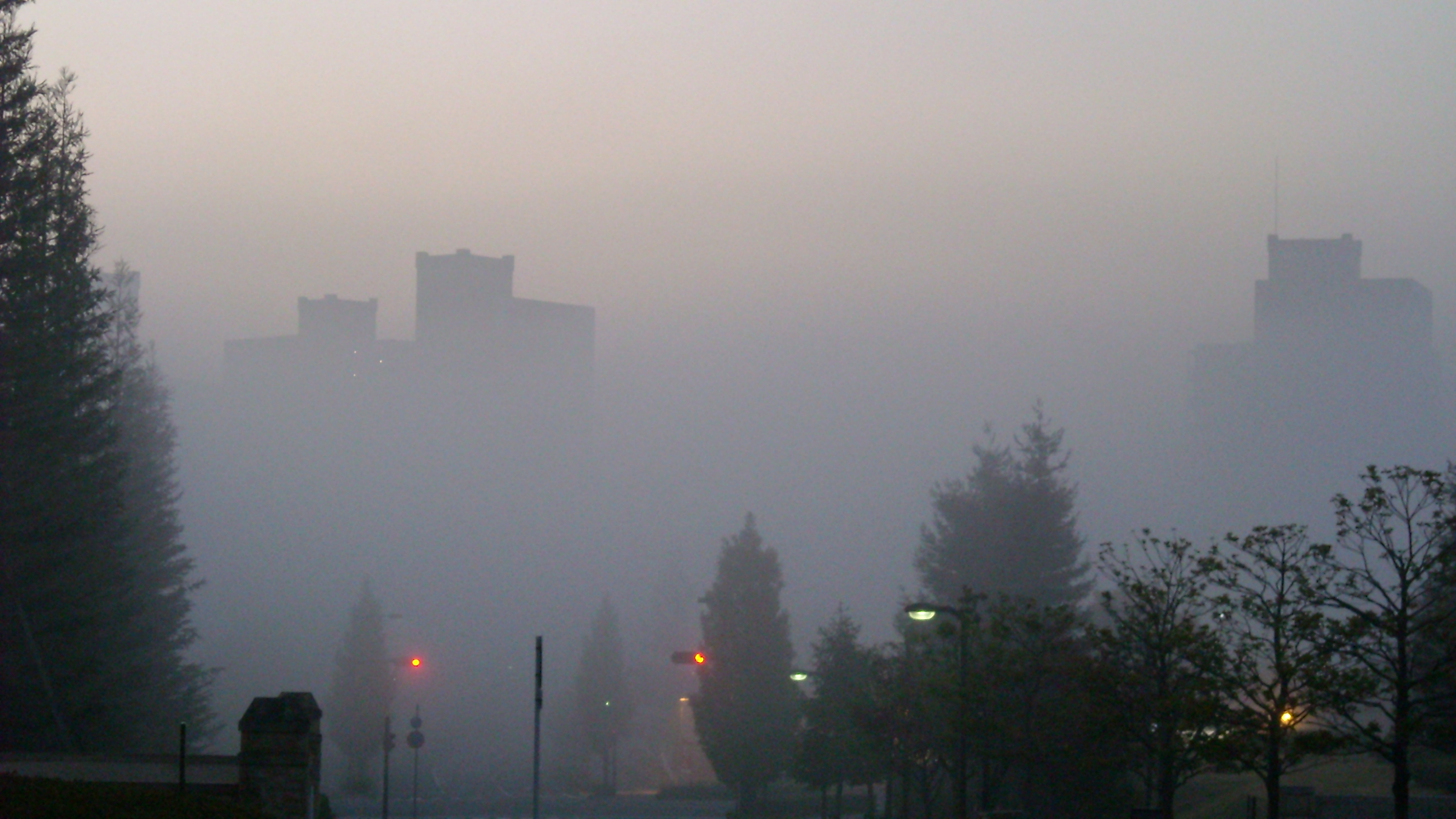 "早朝の霧（兵庫県三田市の早朝）"